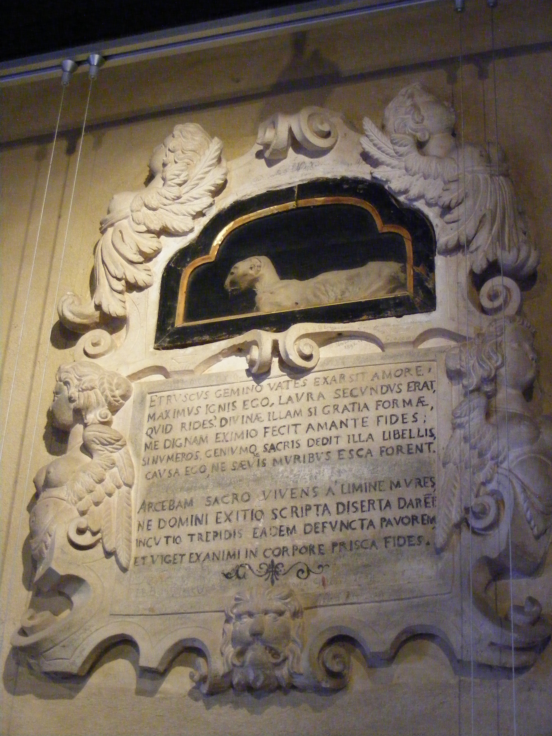 casa del Petrarca This is a photo of a monument which is part of cultural heritage of Italy.